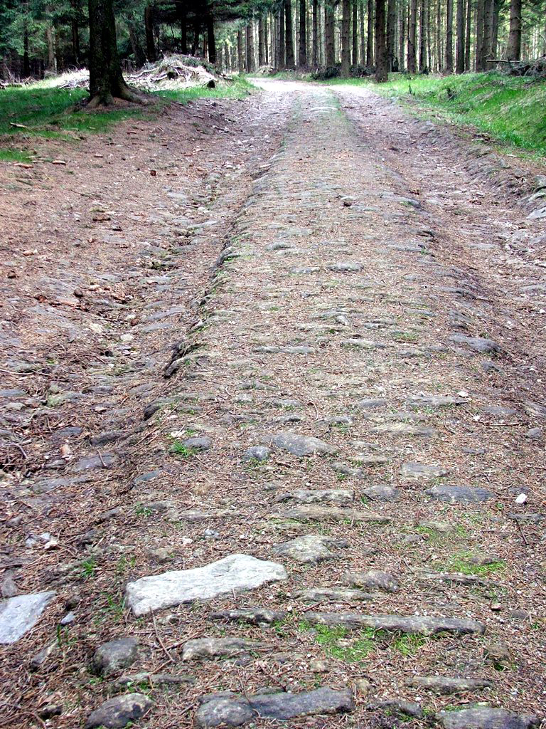 Tzw. Sucha Droga prowadząca ze Starej Morawy na Przełęcz Suchą (Góry Bialskie, Sudety Wschodnie, Polska)